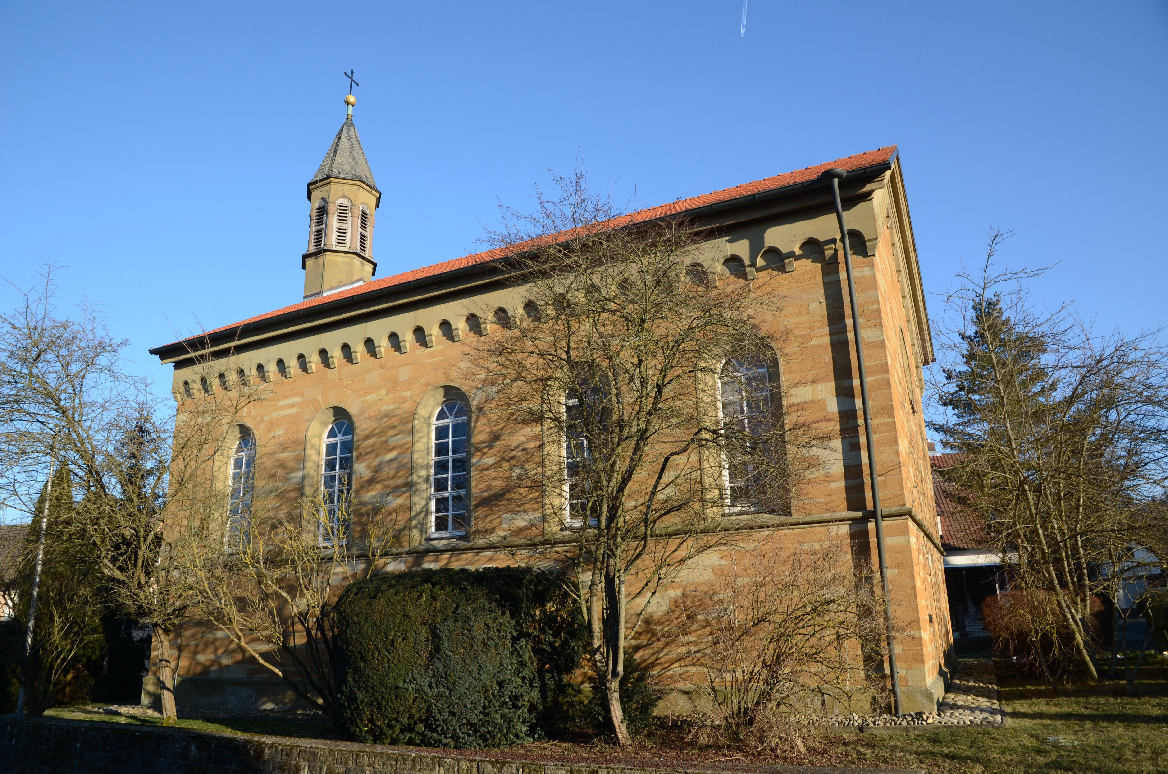 Evang.-Luth. Kirche in Madenhausen